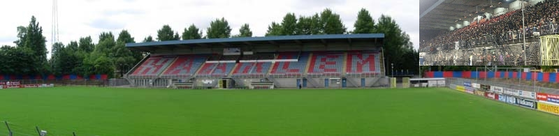 Foto van noord naar zuid met rechtsboven en volle tribune in het seizoen 2005-2006